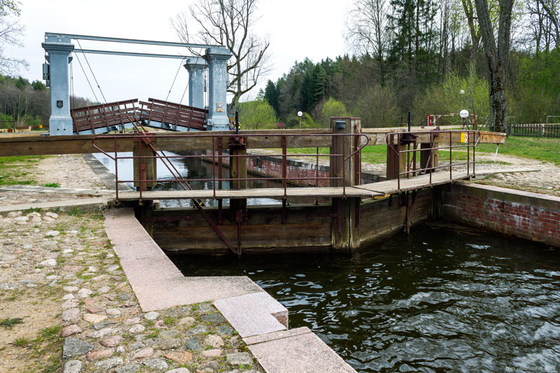 Аўгустоўскі канал. Шлюз Дамброўка